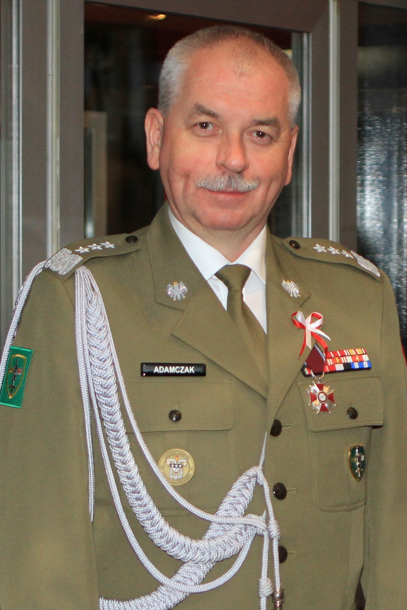 Generał broni Janusz Adamczak